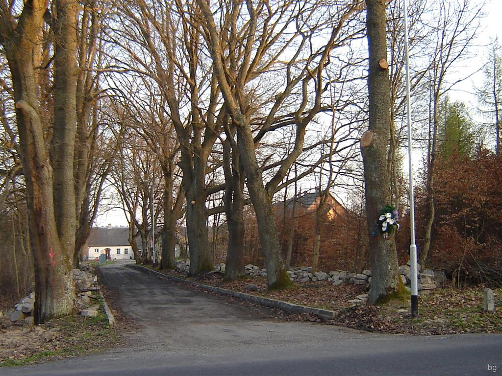 Bąbnica – była osada w Polsce, do końca 2006 roku figurująca w SIMC jako 313874, położona w województwie zachodniopomorskim, w powiecie białogardzkim, w gminie Tychowo. W latach 1975–1998 wieś należała do województwa koszalińskiego. Nazwa z nadanym identyfikatorem SIMC występuje w zestawieniach archiwalnych TERYT z 1999 roku. Od 1 stycznia 2007 roku jako ulica Dębowa stanowi integralną część Tychowa.